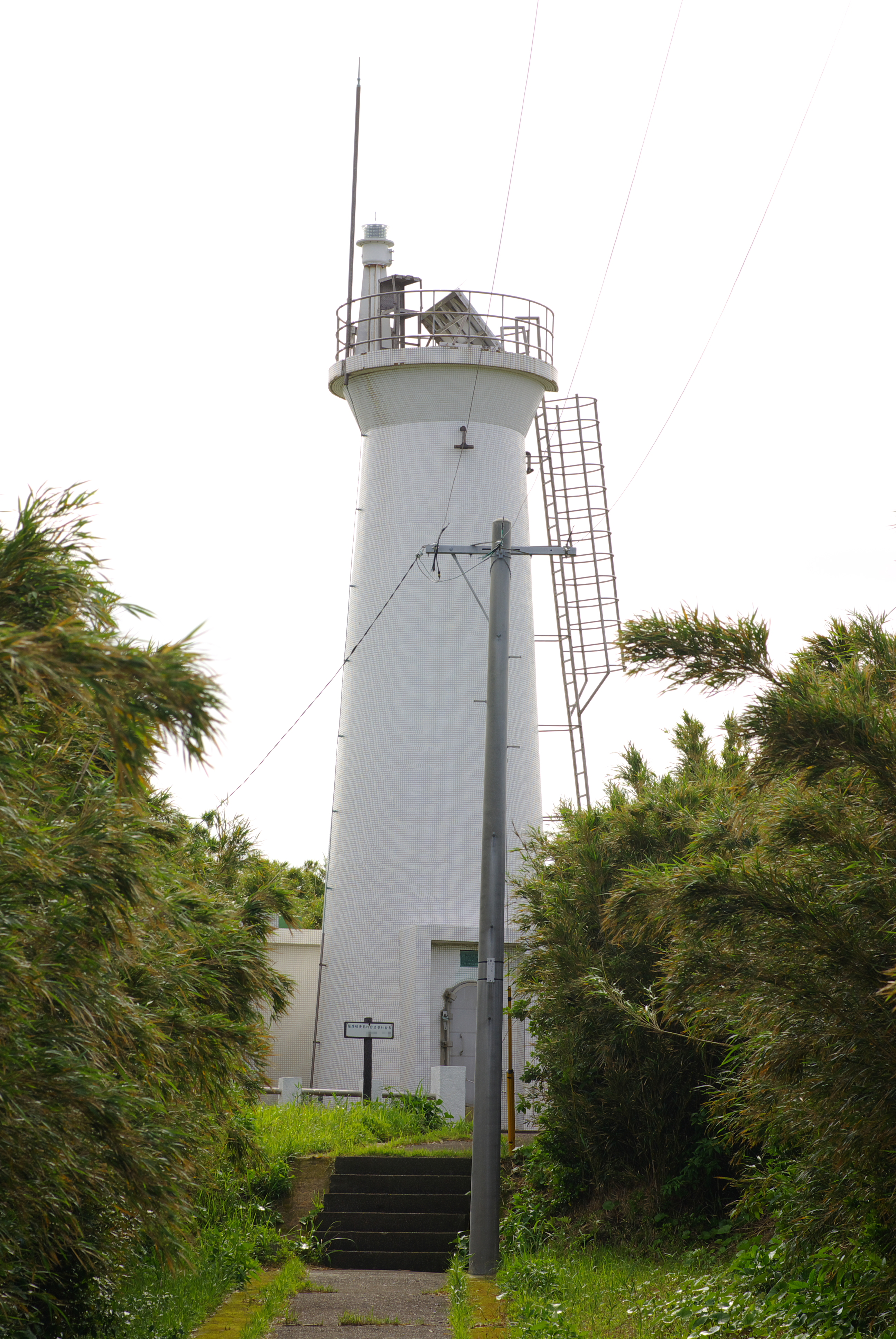 薩摩硫黄島灯台。鹿児島県三島村硫黄島。